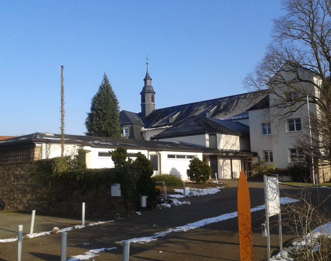 Klosterkirche der Abtei vom Hl. Kreuz, Herstelle, Beverungen